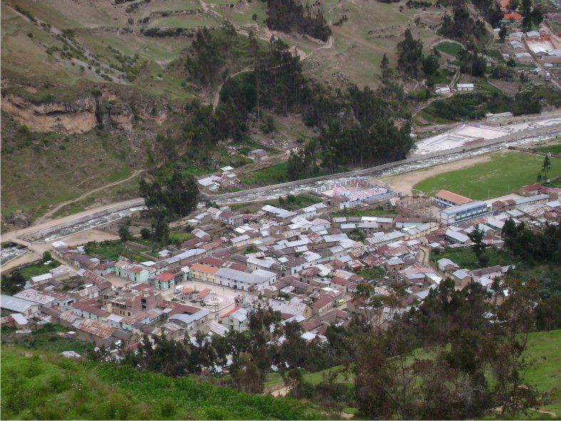 es un distrito muy acogedor